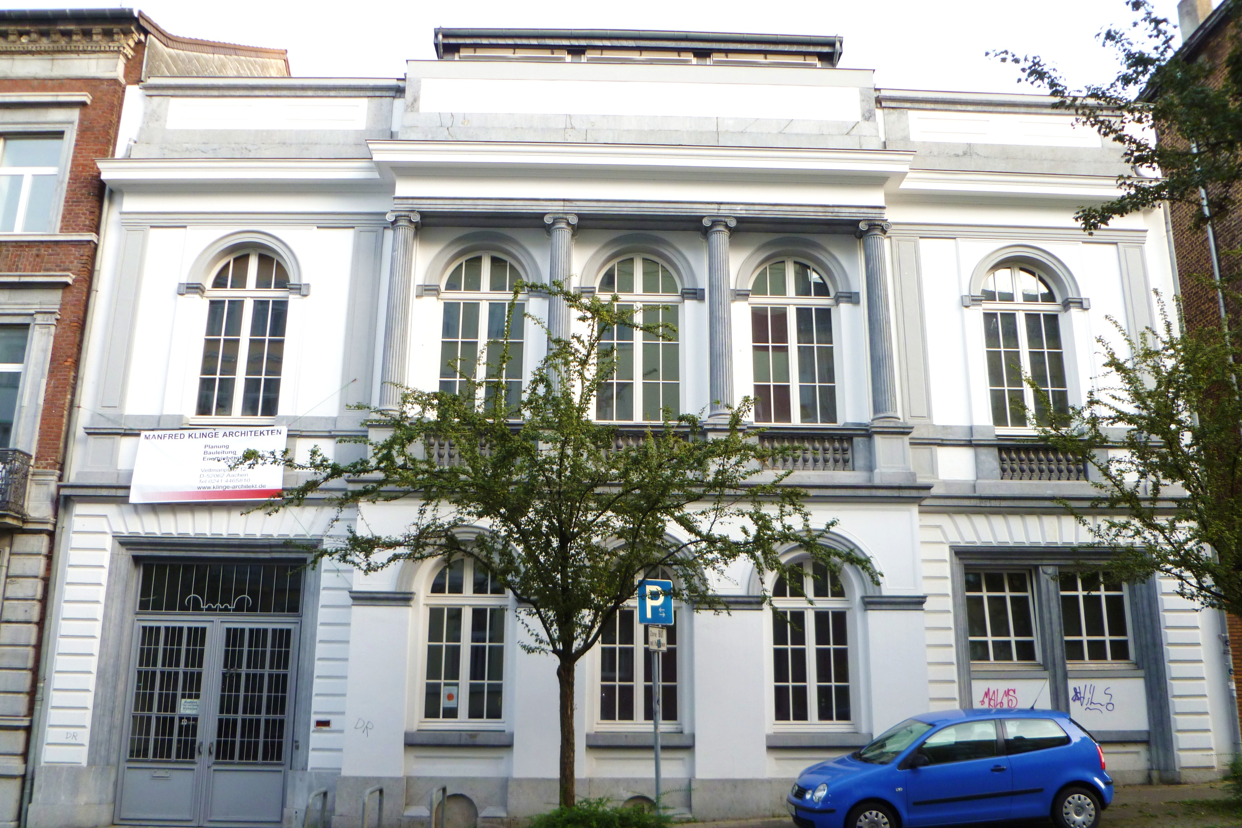 Baudenkmal in Burtscheid